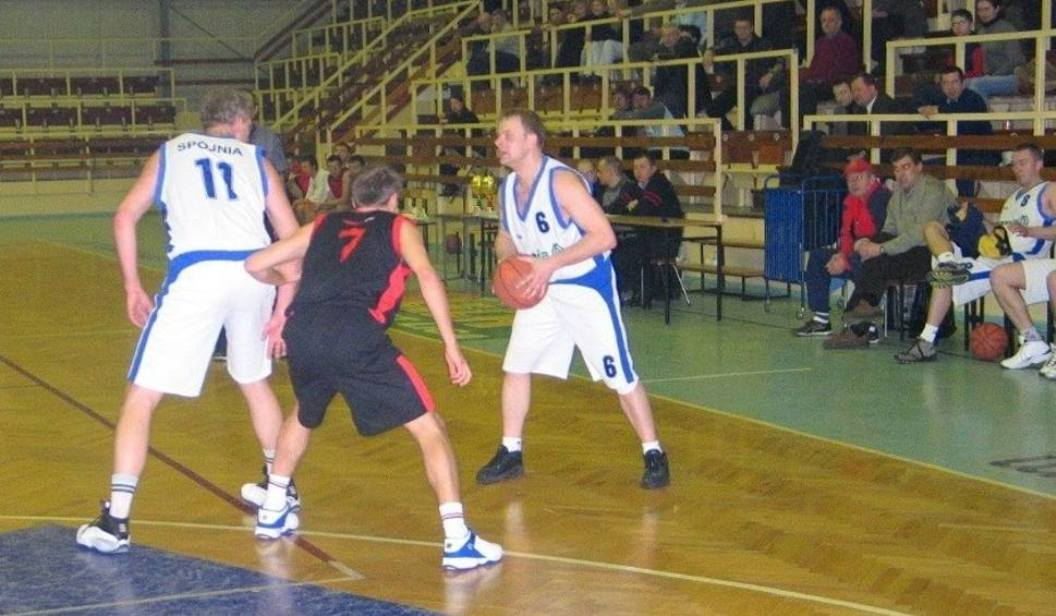 Spójnia Stargard. Robert Szczerbala (2004)